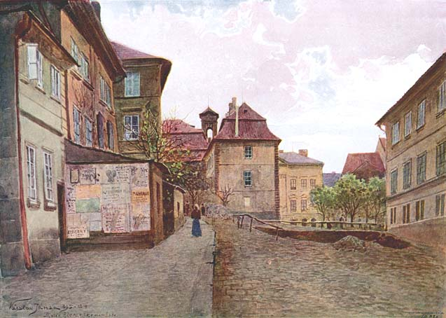 Na Zderaze, pohled od severu od nároží s ulicí Na Zbořenci (vlevo)